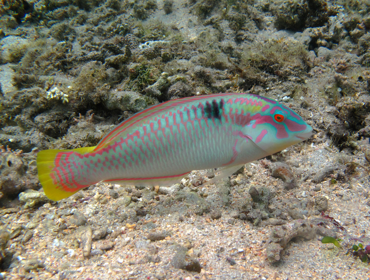 Un labre zig-zag (Halichoeres scapularis) mâle à la Réunion.